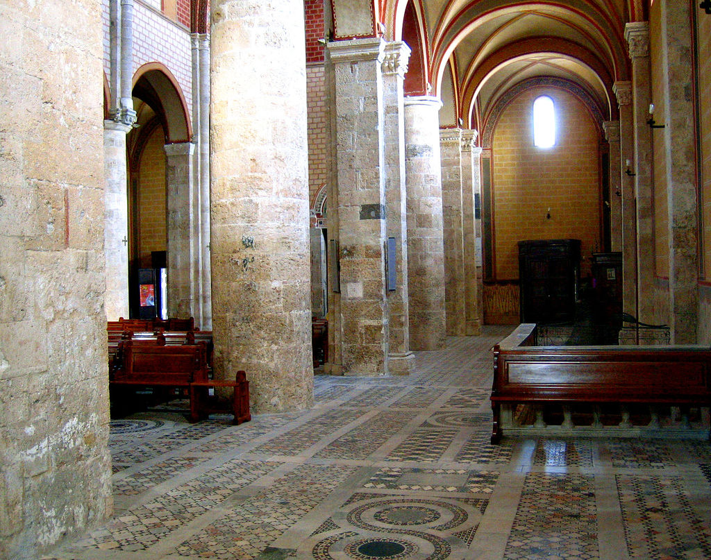 Anagni, Lazio, Italia